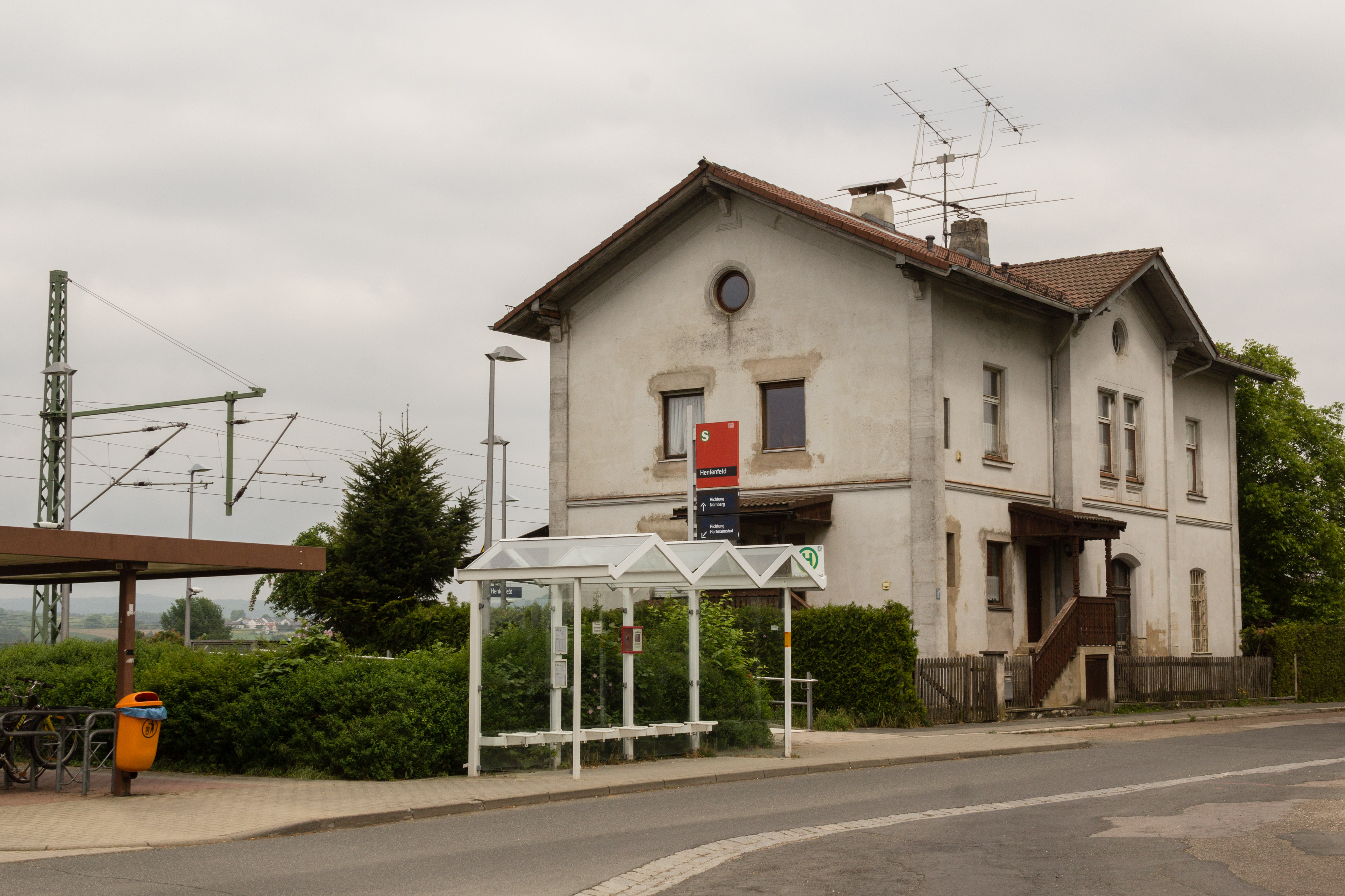 Henfenfeld, Bahnhof, S-Bahn Station